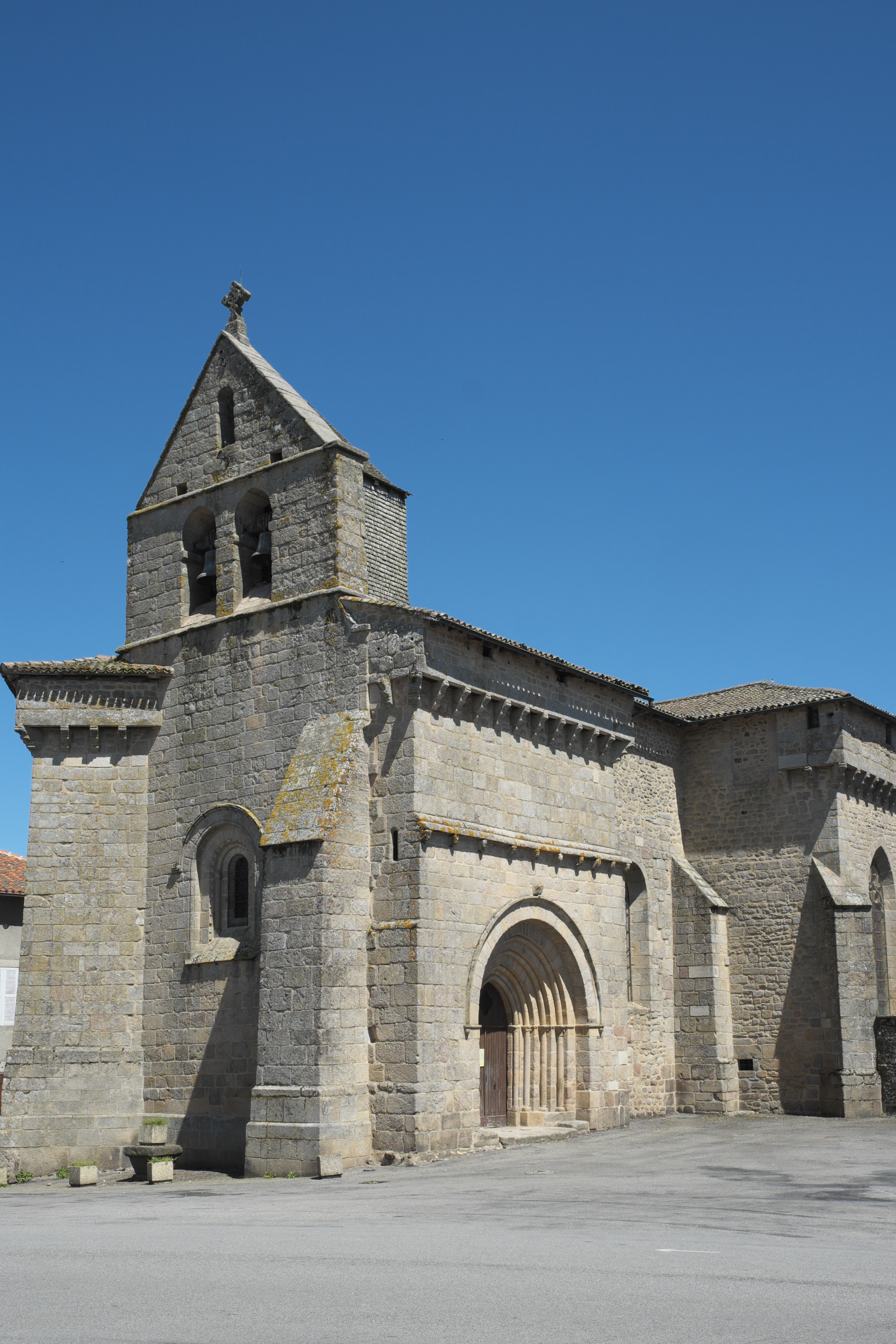 Katholische Kirche Saint-Martin in Compreignac im Département Haute-Vienne (Nouvelle-Aquitaine/Frankreich)